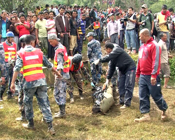 नेपाली: बुद्ध एअर दुर्घटना